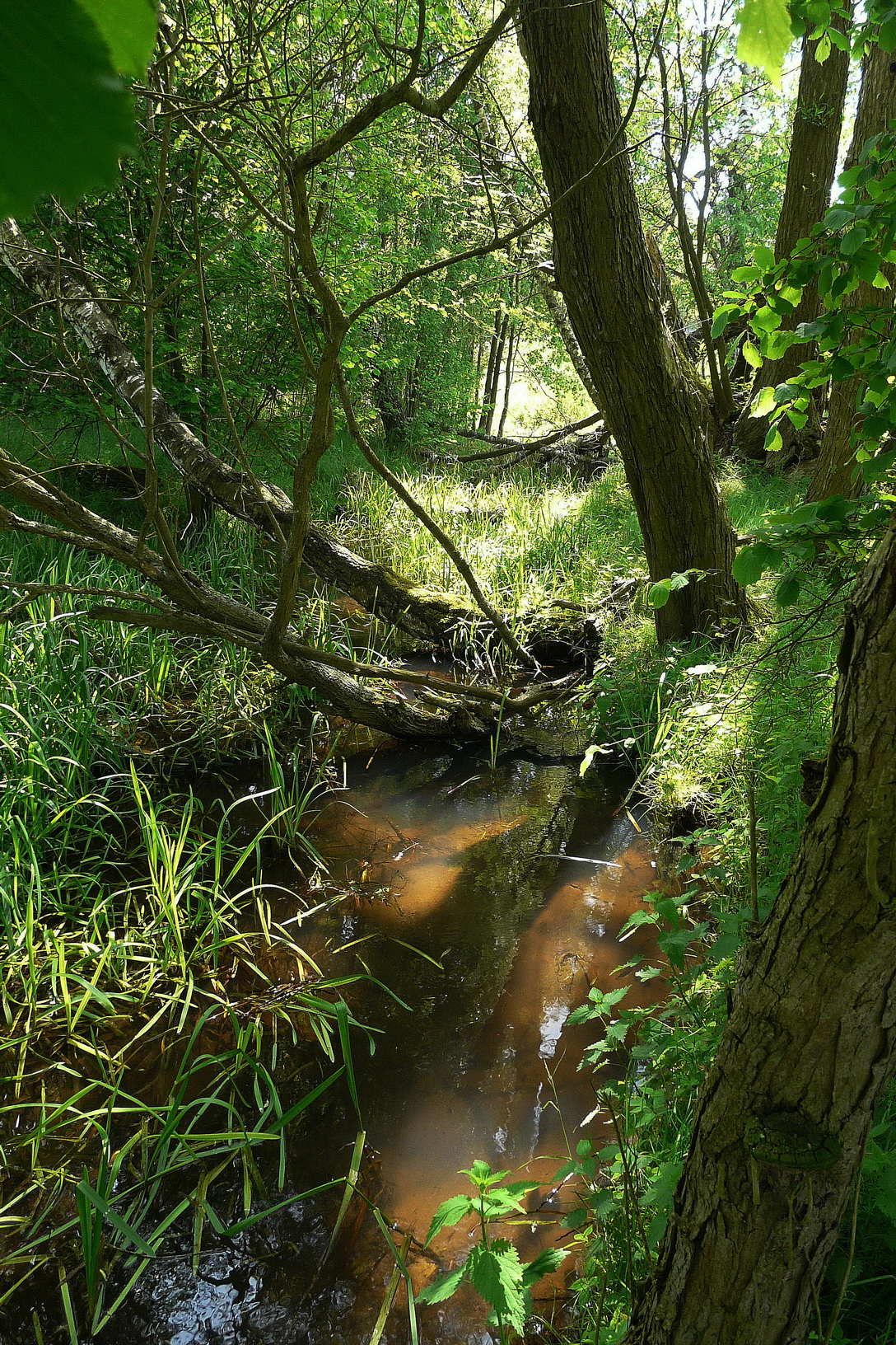 Robečský potok u Obory